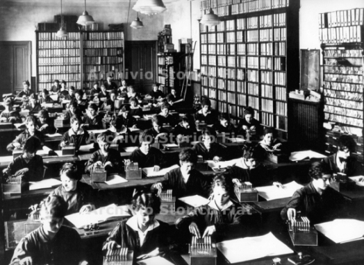 Impiegate addette alle macchine calcolatrici all'interno dell'ufficio contabilità dello stabilimento Fiat Lingotto (Fiat Group Marketing & Corporate Communication spa, Archivio e centro storico Fiat, Archivio iconografico, Album Tematici, album 92)